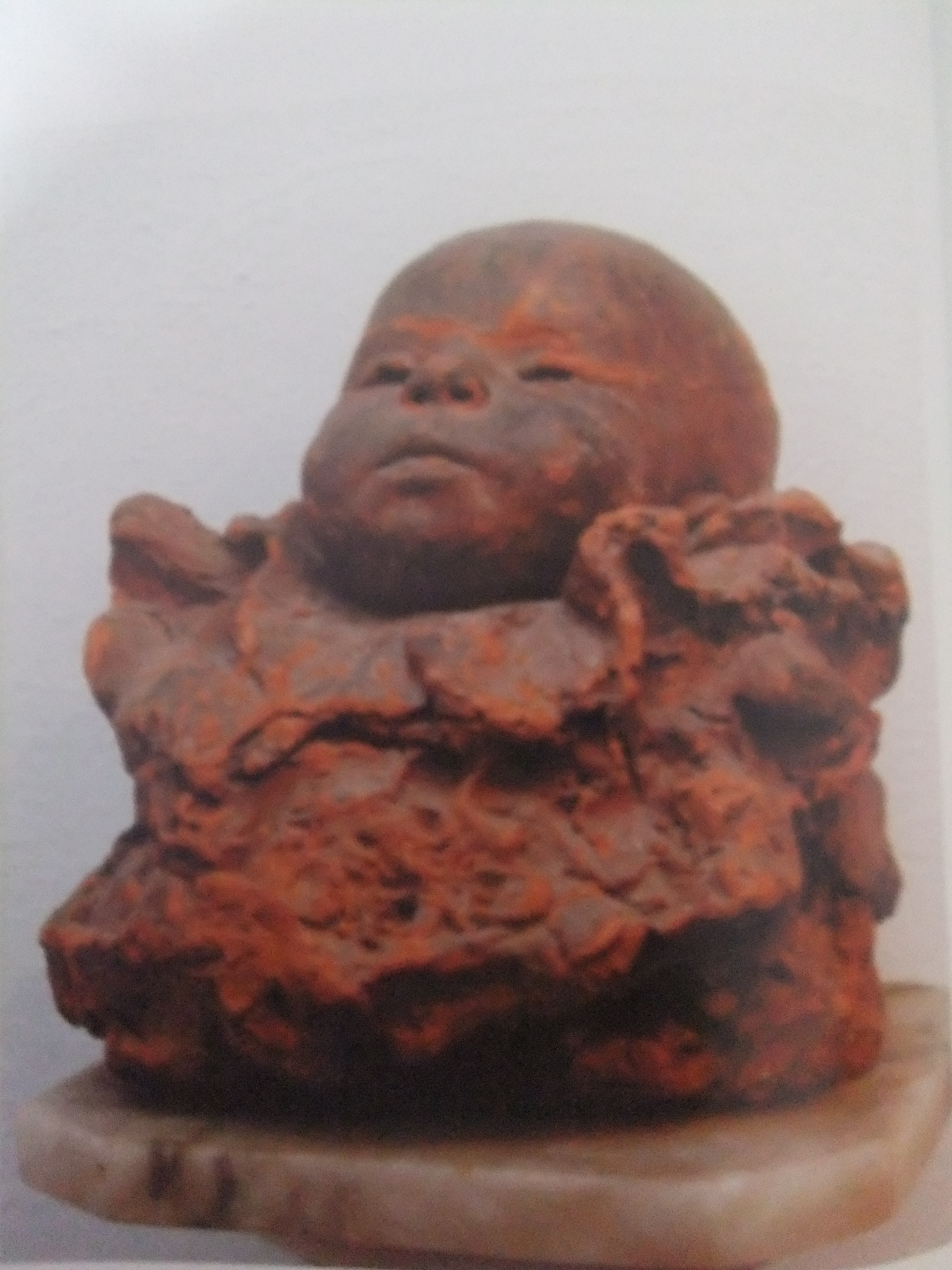 Argila sense coure Carles Mani i Roig